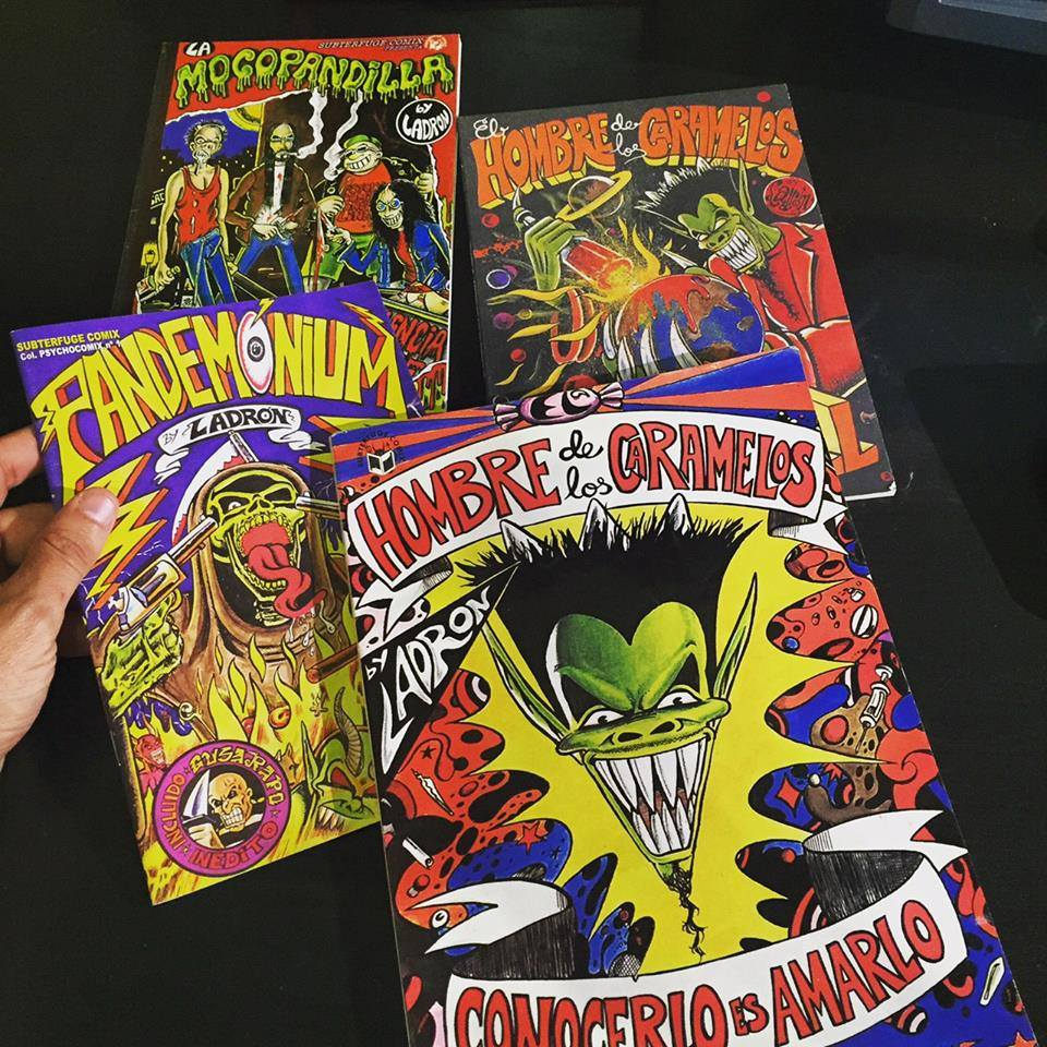 Vida y obra de Ladroncomix. ¡Línea tremenda way of life!